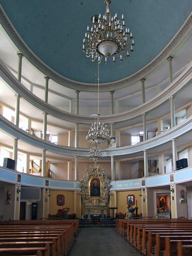 Kościół Maryi Matki Kościoła widok na ołtarz.